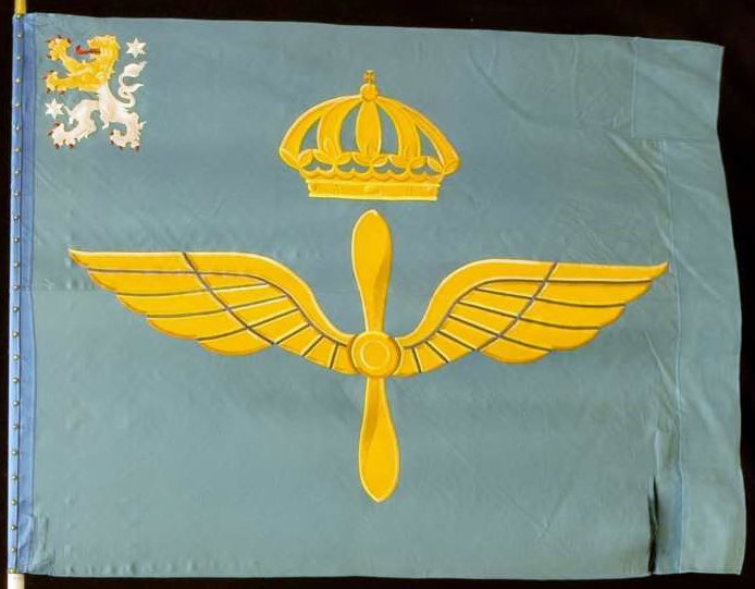 Västgöta flygflottiljs fana, överlämnad den 5 december 1940 i Karlsborg av HKH Kronprinsen Gustaf Adolf. Fanan överlämnad till Skaraborgs flygflottilj (F 13) år 1994. Fanan är återlämnad till Armémuseum.